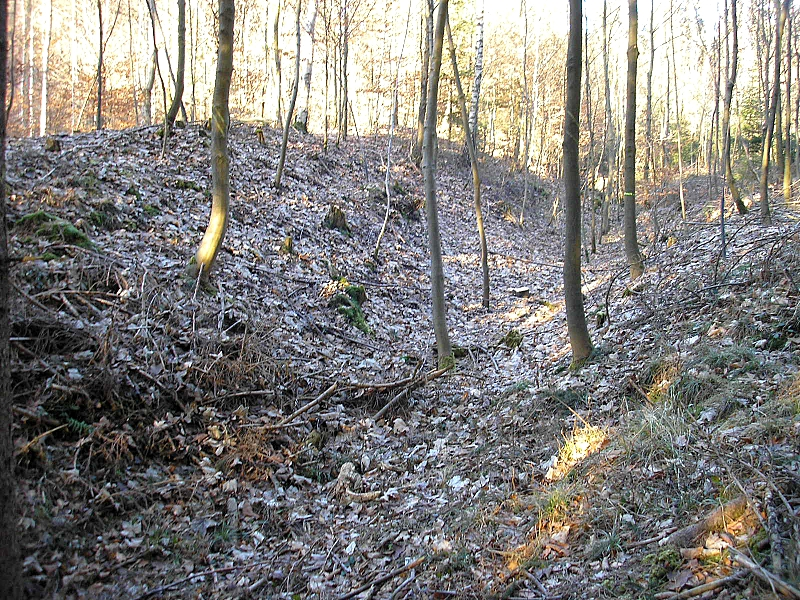 Frühmittelalterliche Abschnittsbefestigung "Pfarrerschanze" bei Todtenweis (Landkreis Aichach-Friedberg, Bayerisch-Schwaben). Der Wallgraben der Vorburg nach Norden. Eigene Aufnahme, Feb. 2008 / Early Middle Ages hill fort "Pfarrerschanze" near Todtenweis (Landkreis Aichach-Friedberg, Bavaria, Germany). The earthworks of the bailey, looking north. Own photo, Feb. 2008